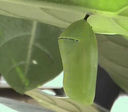 plain tiger pupa, BKC, Mumbai